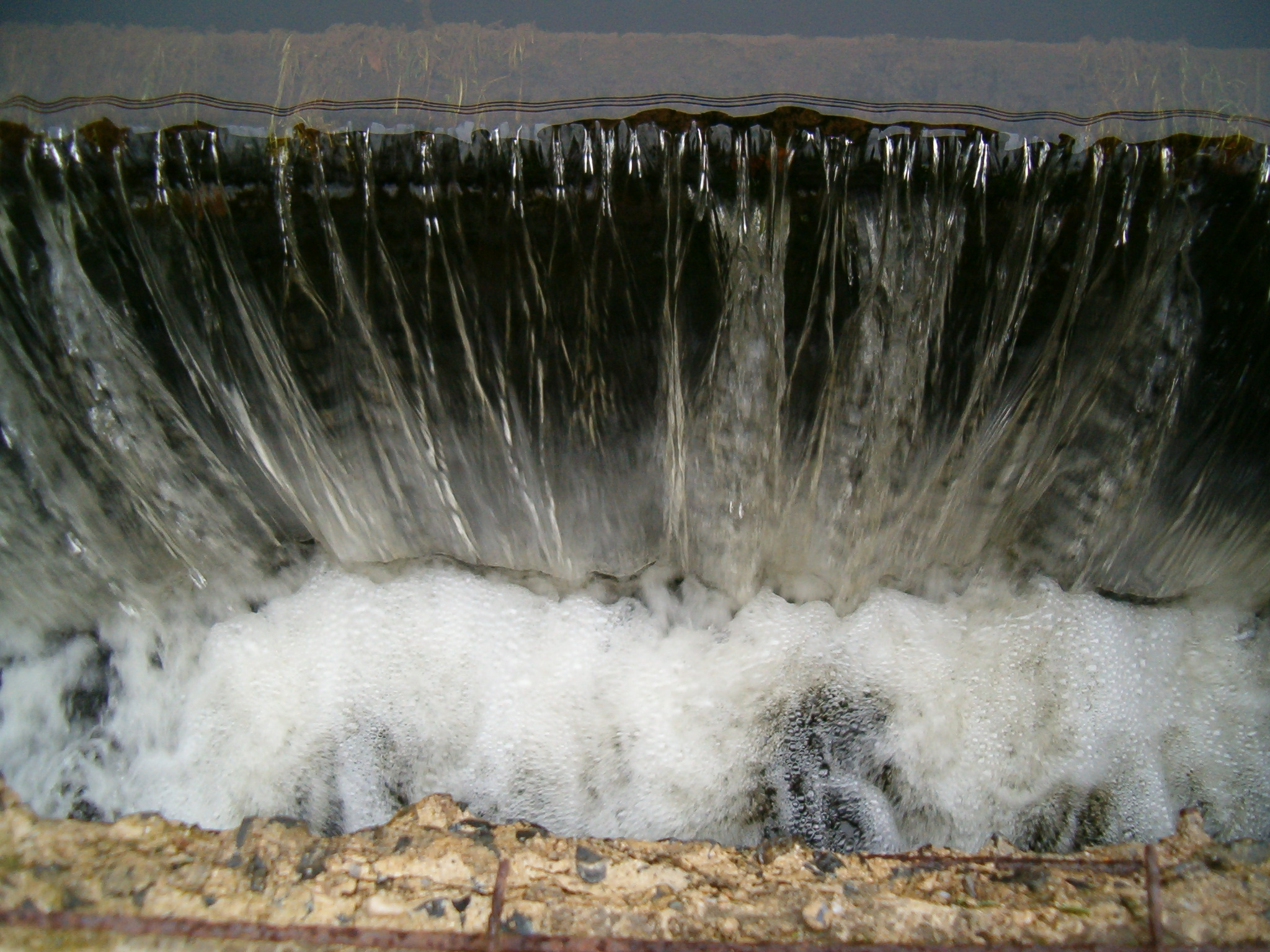 blatny rybnik